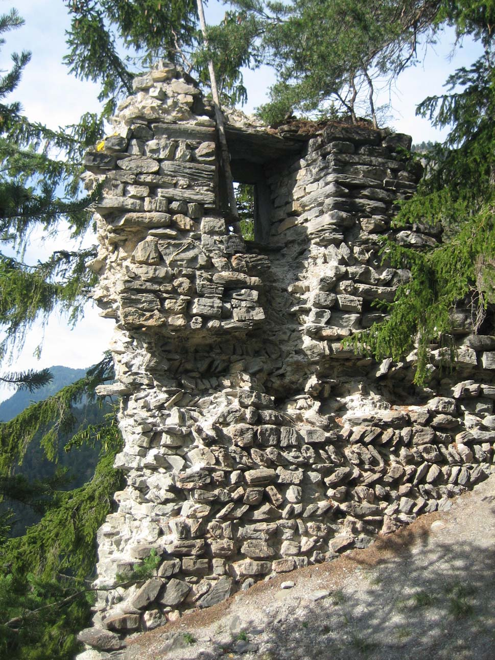 Mauerrest mit Fenster